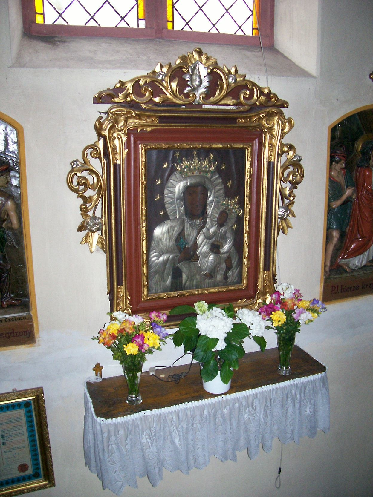 Kościół pw. Najświętszej Marii Panny w Krowiarkach: Matka Boska Częstochowska